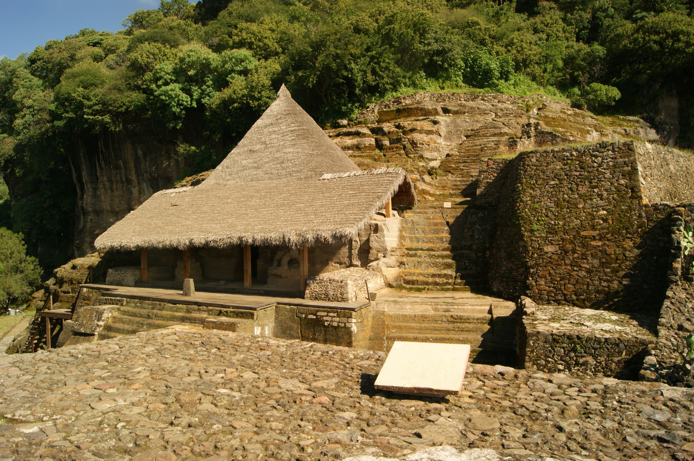 Malinalco